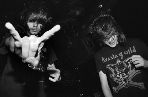 Heavy Metaller in der Disco Fantasy (1981-2001) in München-Neuaubing